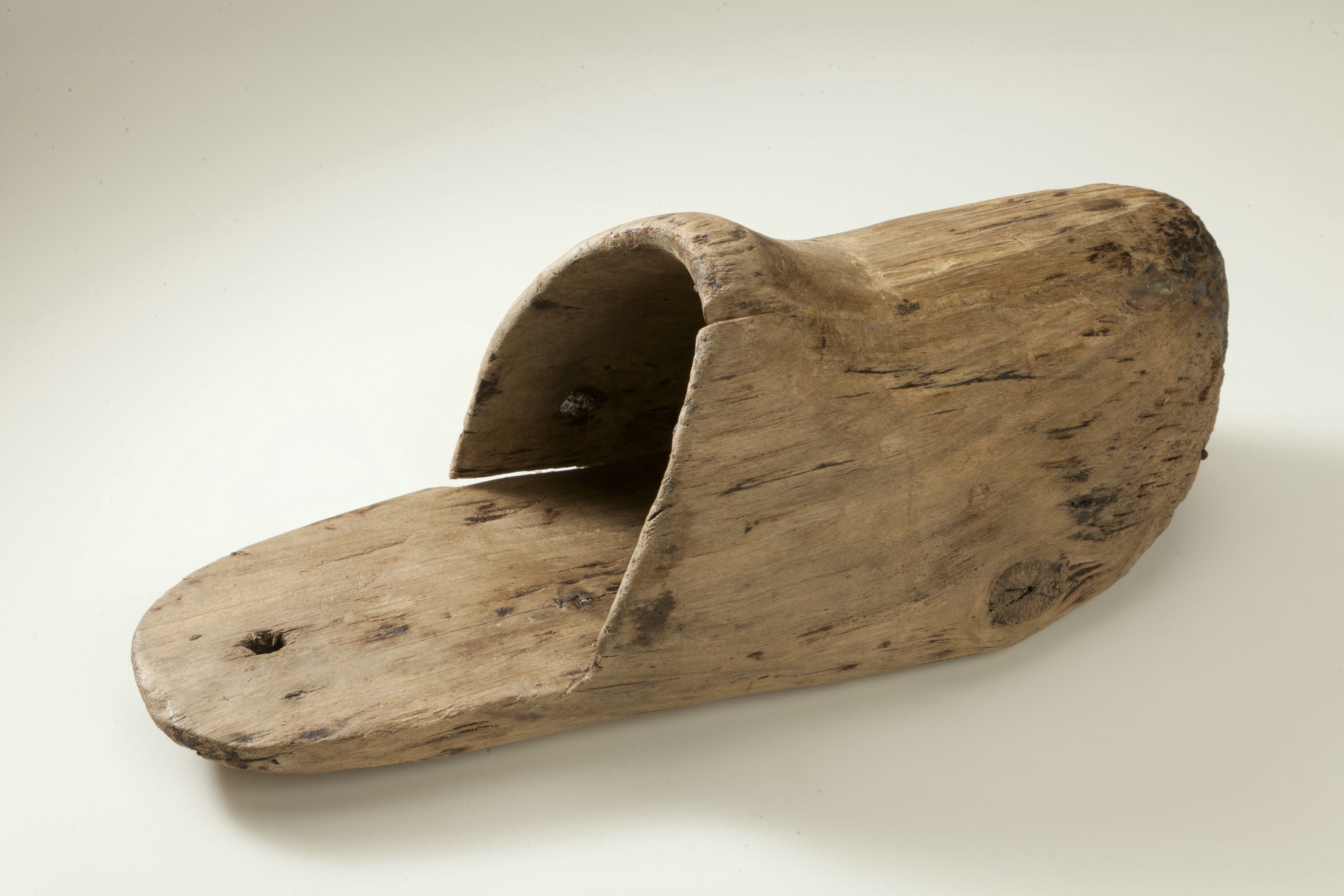 klomp, waarvan de hak is verwijderd, met klein gaatje voor ophangen (hergebruikt), 'zool' compleet glad gesleten Objectnummer: [MA]NH49-180 Materiaal: hout